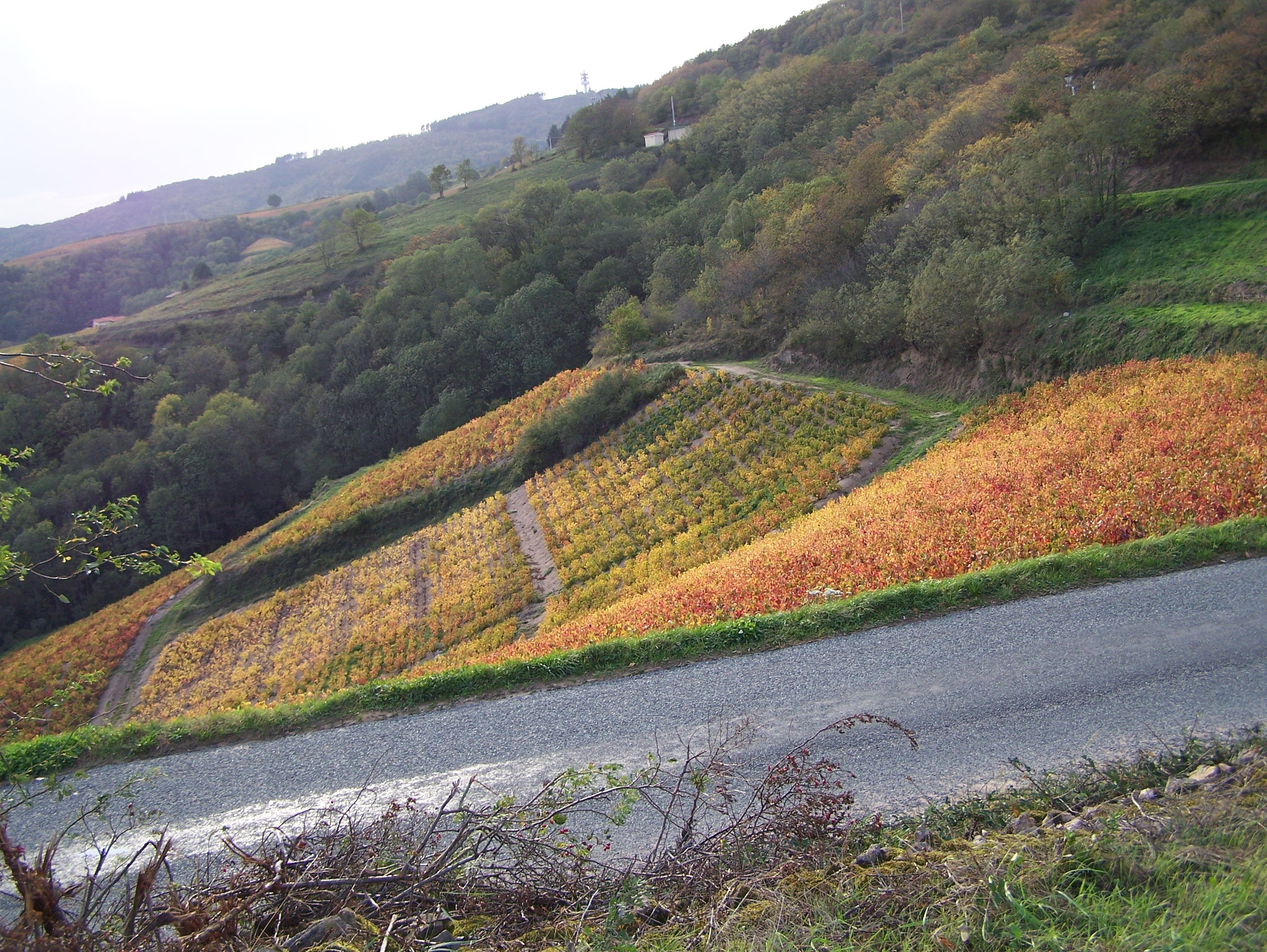 Avenas dans le département français du Rhône : Vignes en automne au dessus d'Avenas.